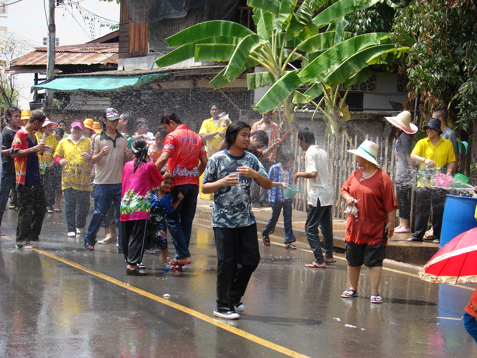 Songkran in Laplae, Uttaradit, Thailand